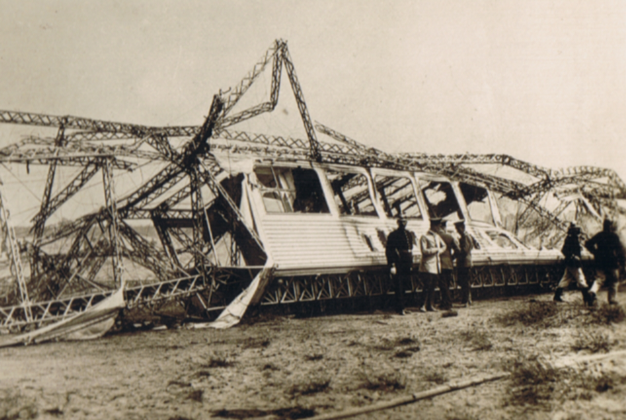 Ausgebrannte LZ 10 Schwaben. Am 28. Juni 1912 stauchte sich der Zeppelin in einem Sturm in Düsseldorf an der dortigen Luftschiffhallenwand, fing Feuer und verbrannte auf dem Flugfeld.